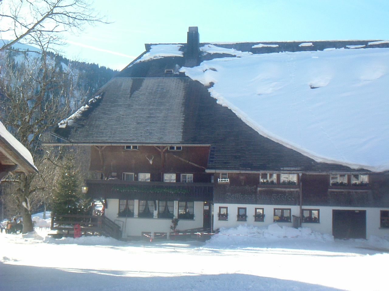 Blick auf den Raimartihof, Längsseite